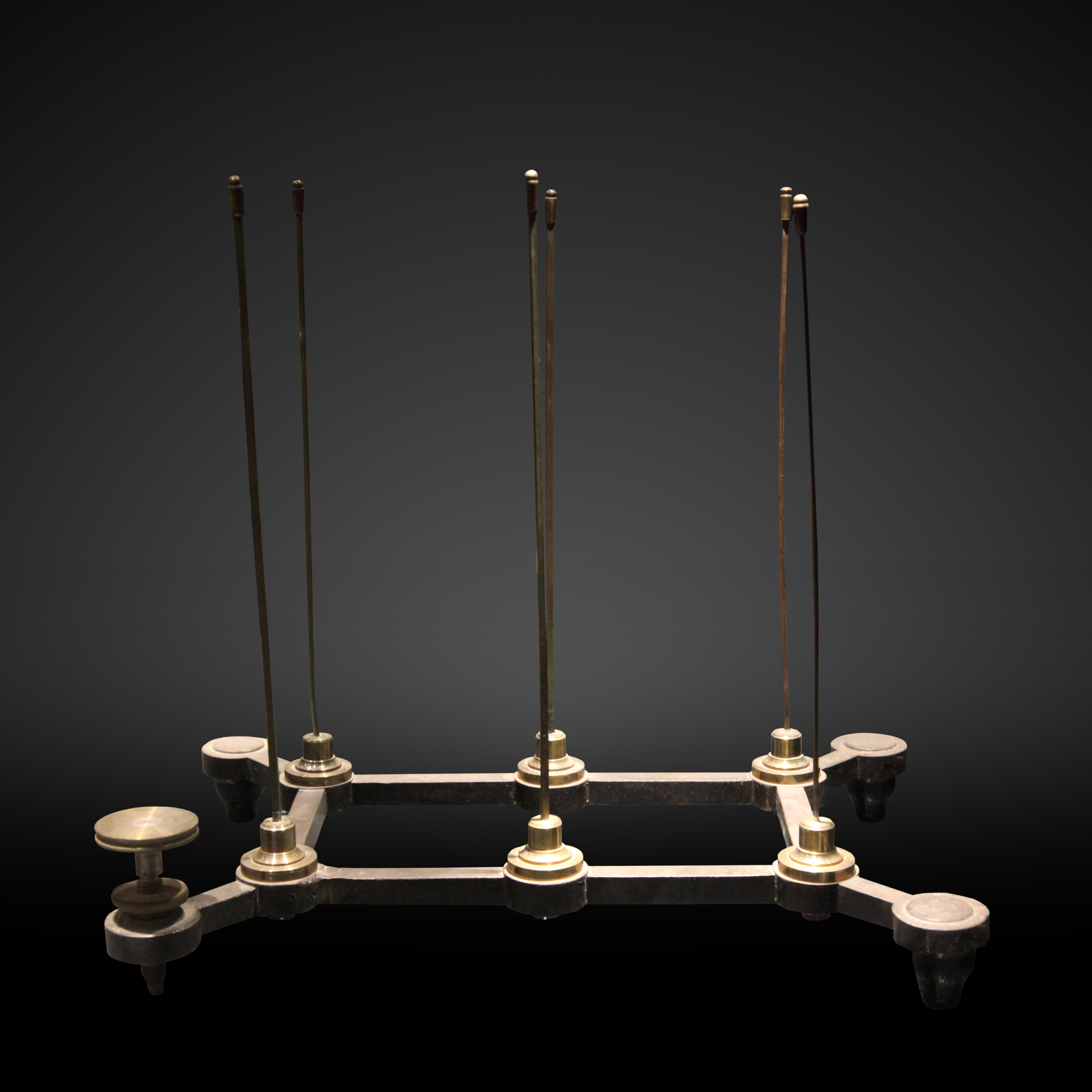 Kaleidophone on display at Palais de la Découverte in Paris